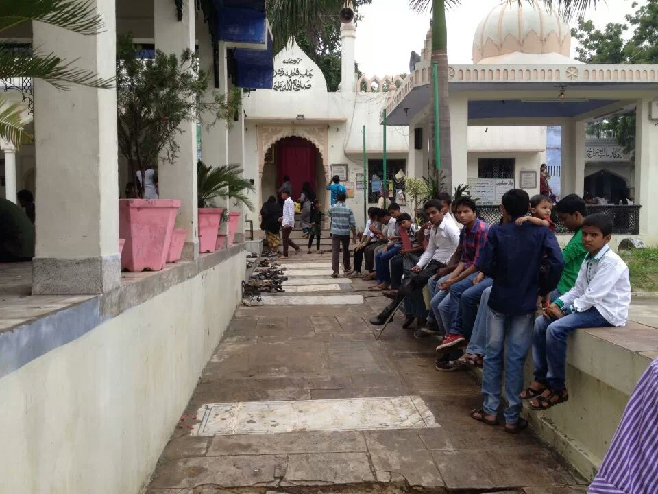 Dargah-e-Fatman in 2013